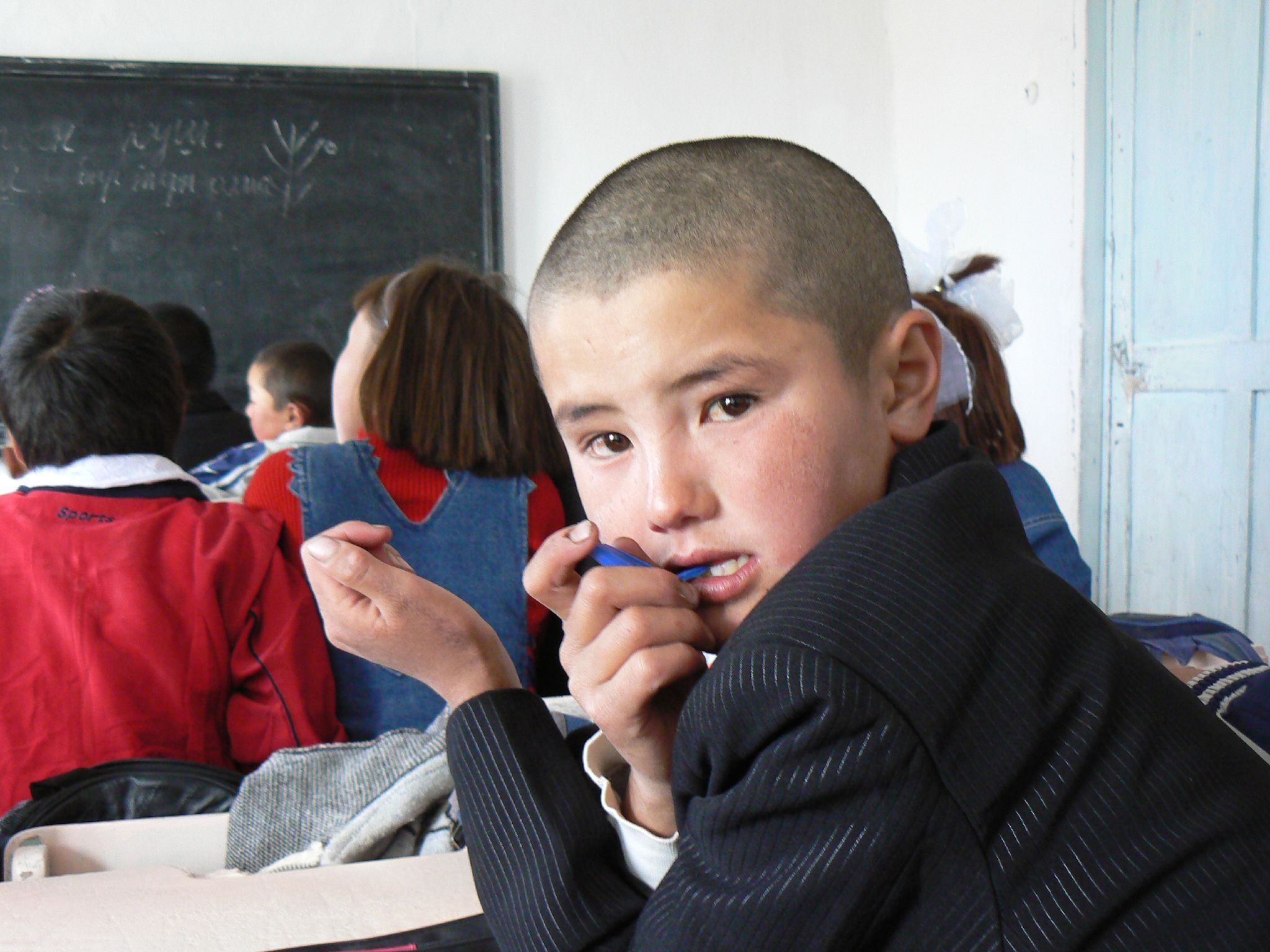 Kyrgyz student